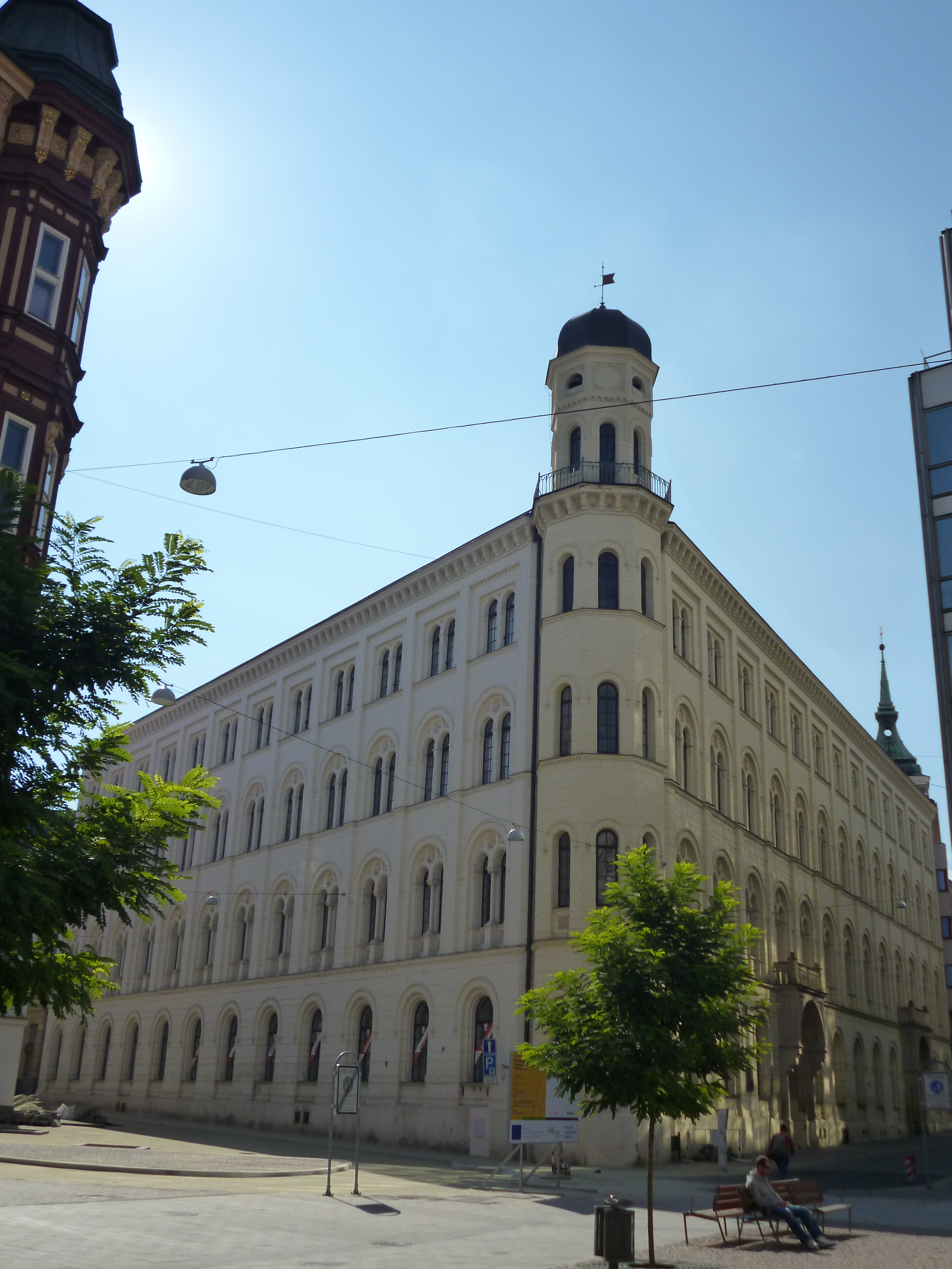 Střední škola - býv. německá reálka (Brno), Brno - město, Jánská, Měnínská 463/22, Brno